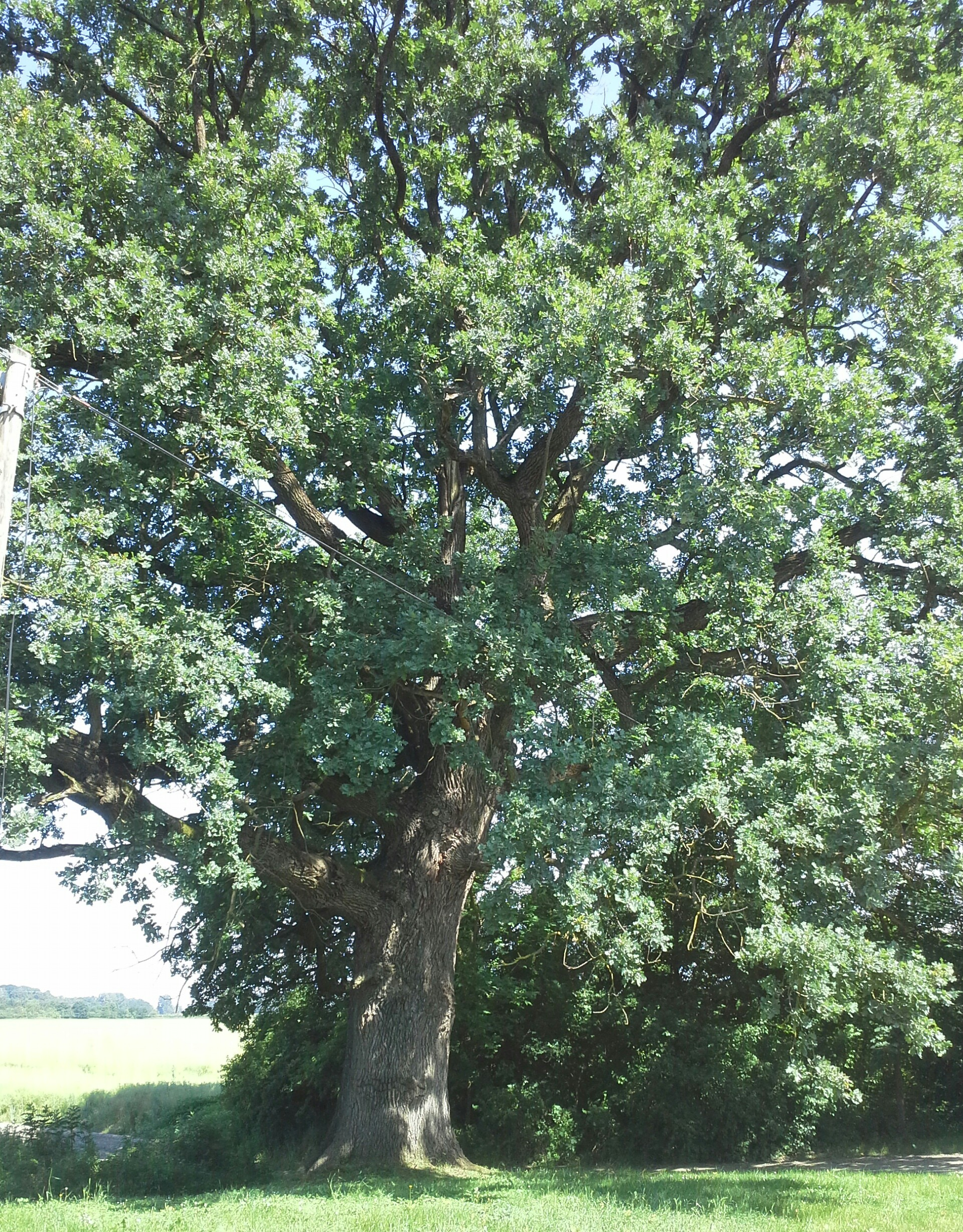 Cún több száz éves tölgye